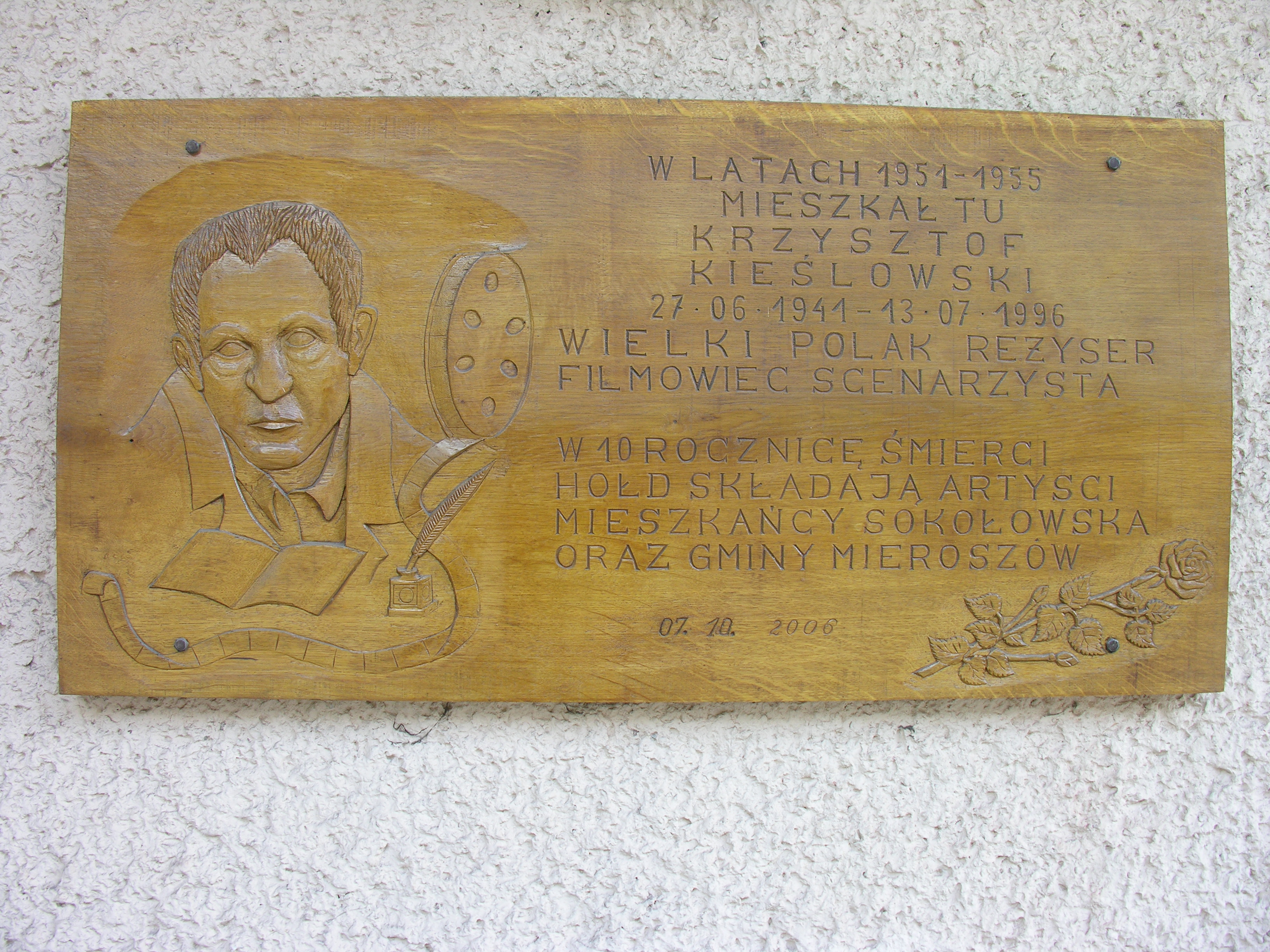 Tablica pamiątkowa na domu, w którym mieszkał Krzysztof Kieślowski w Sokołowsku